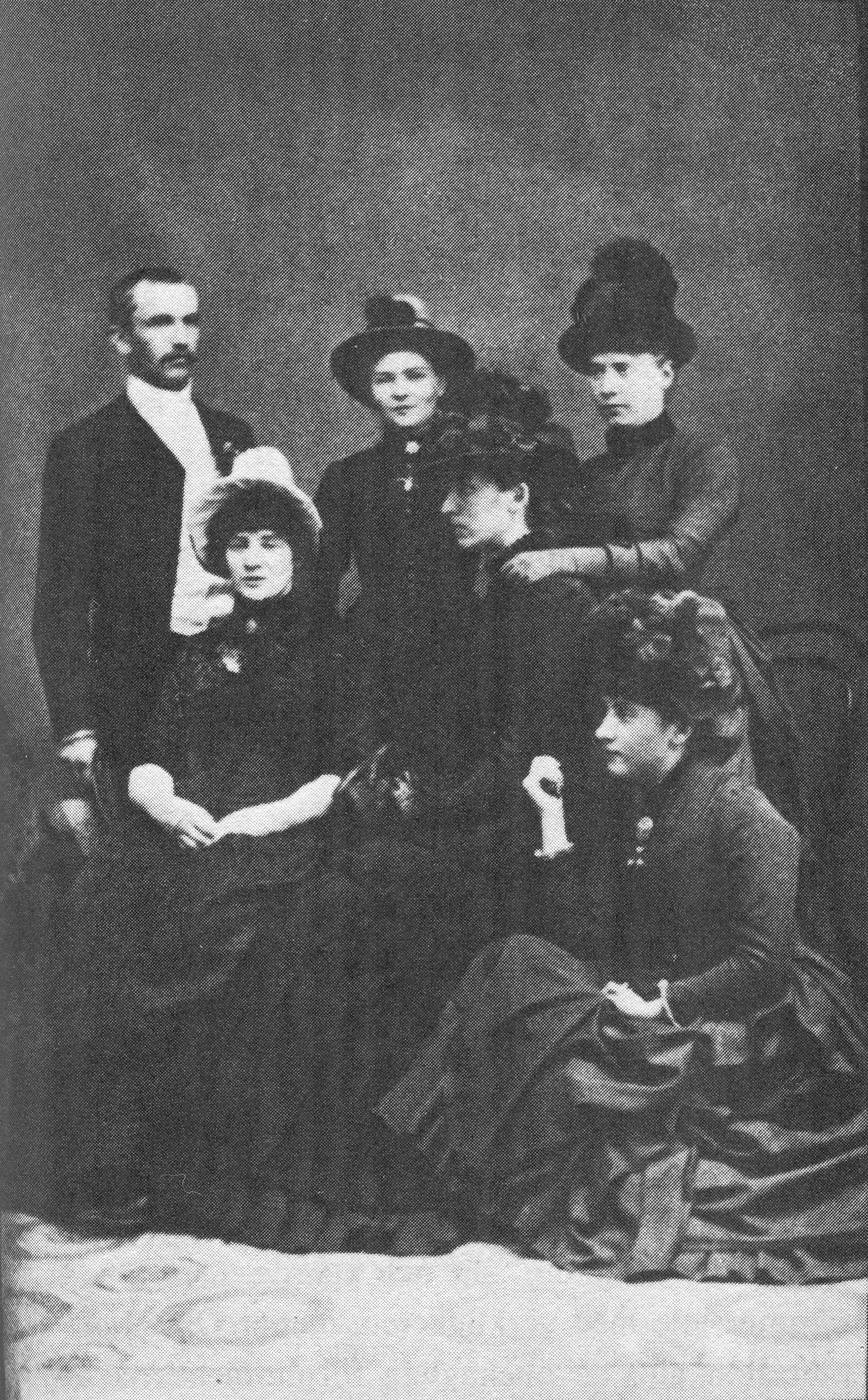 Ola Hansson tillsammans med Ellen Kruse, Hilda Benedictsson (stående) och Mathilda Kruse (Malling), Victoria Benedictsson, Matti Benedictsson (sittande) år 1886.